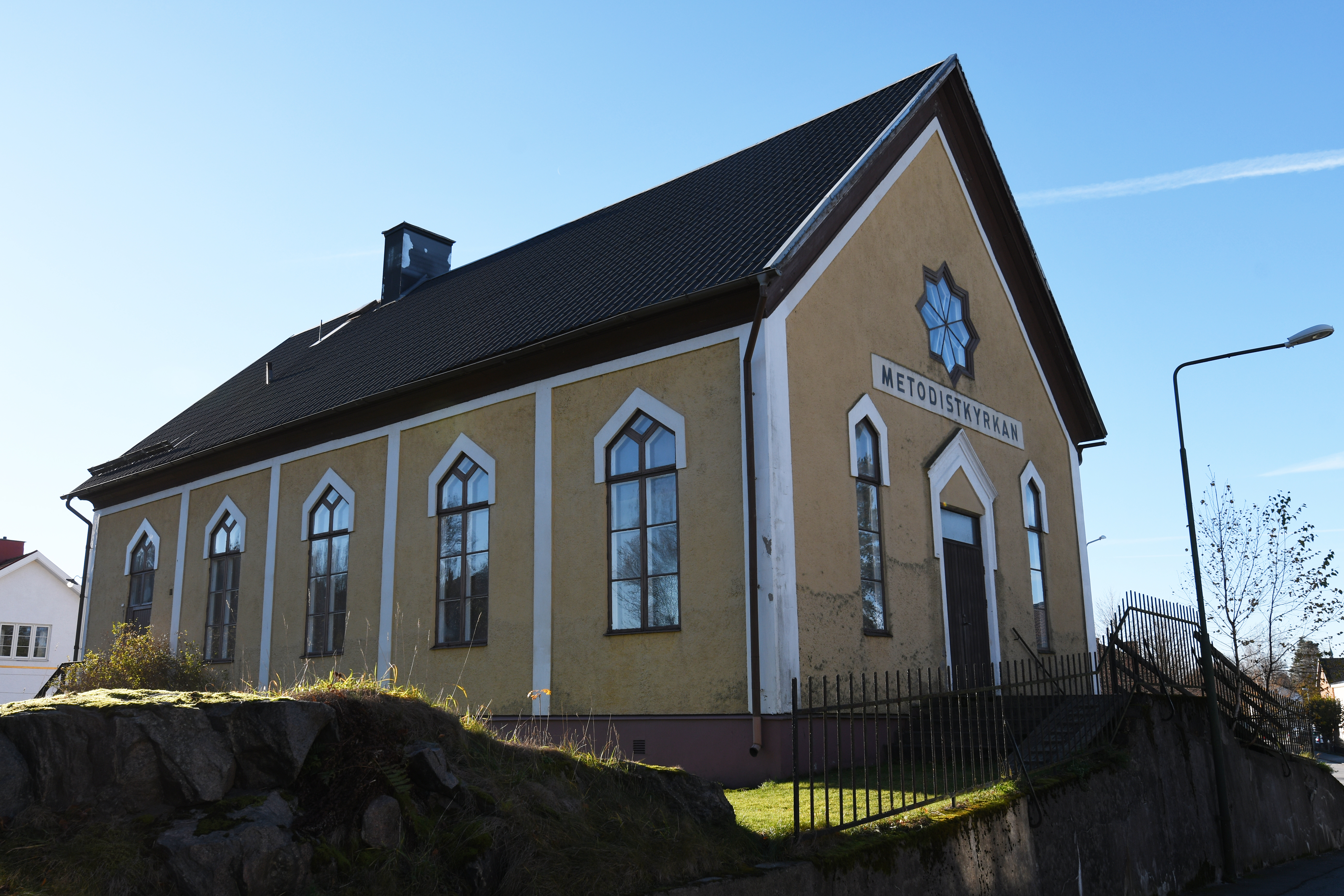 Laxå, november 2018.